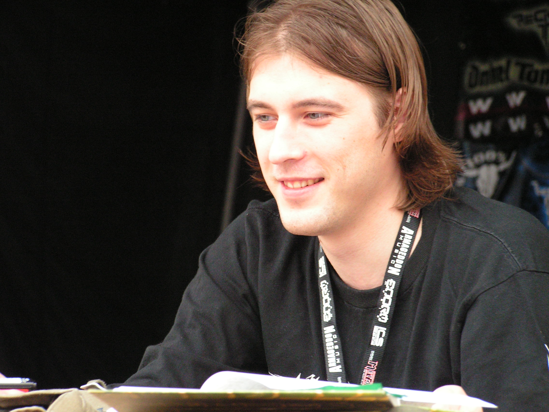 Marko Paasikoski